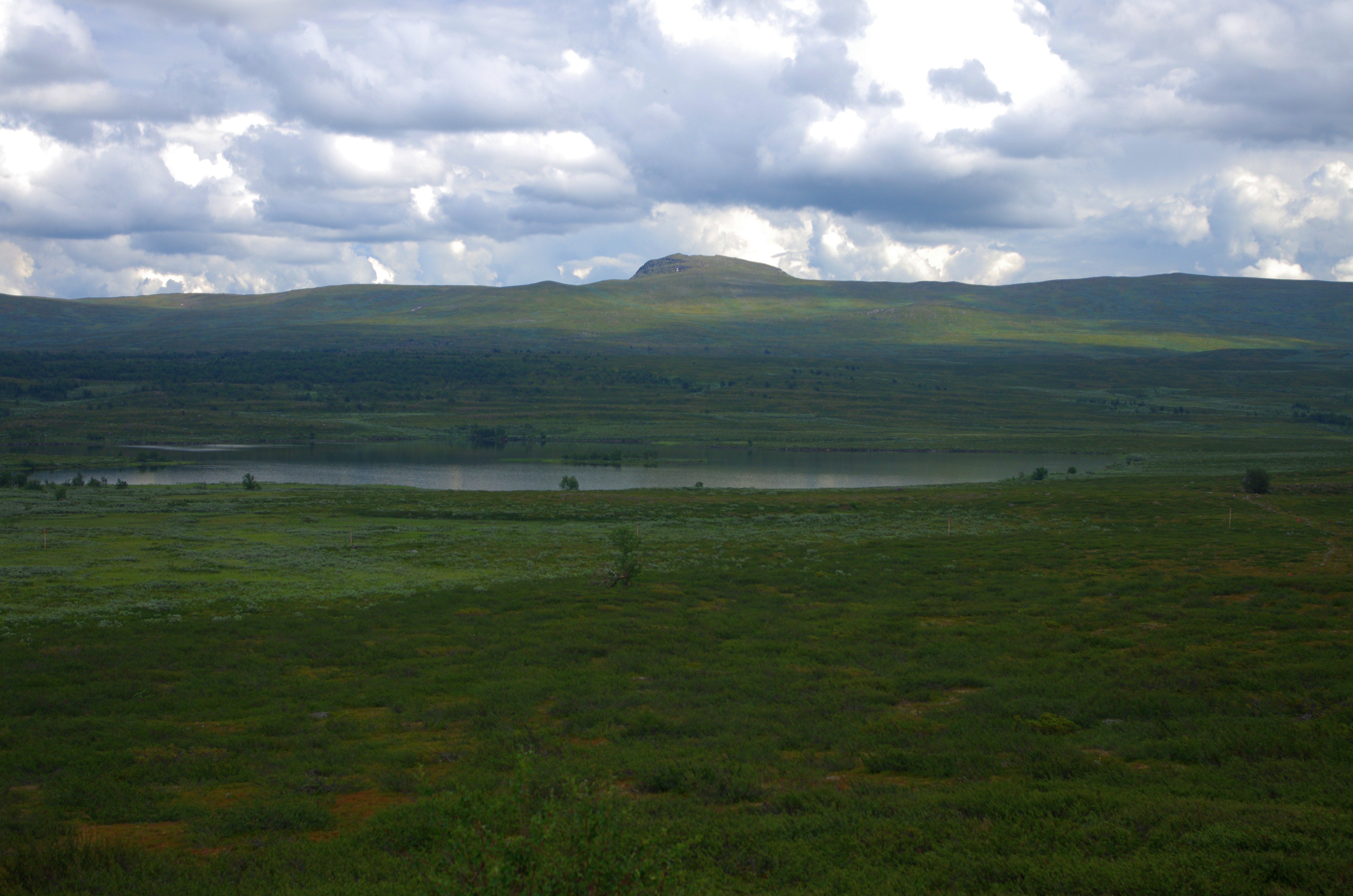 Tsåkaure (Tsågavre) en sjö i Arjeplogs kommun i Lappland i Sverige.